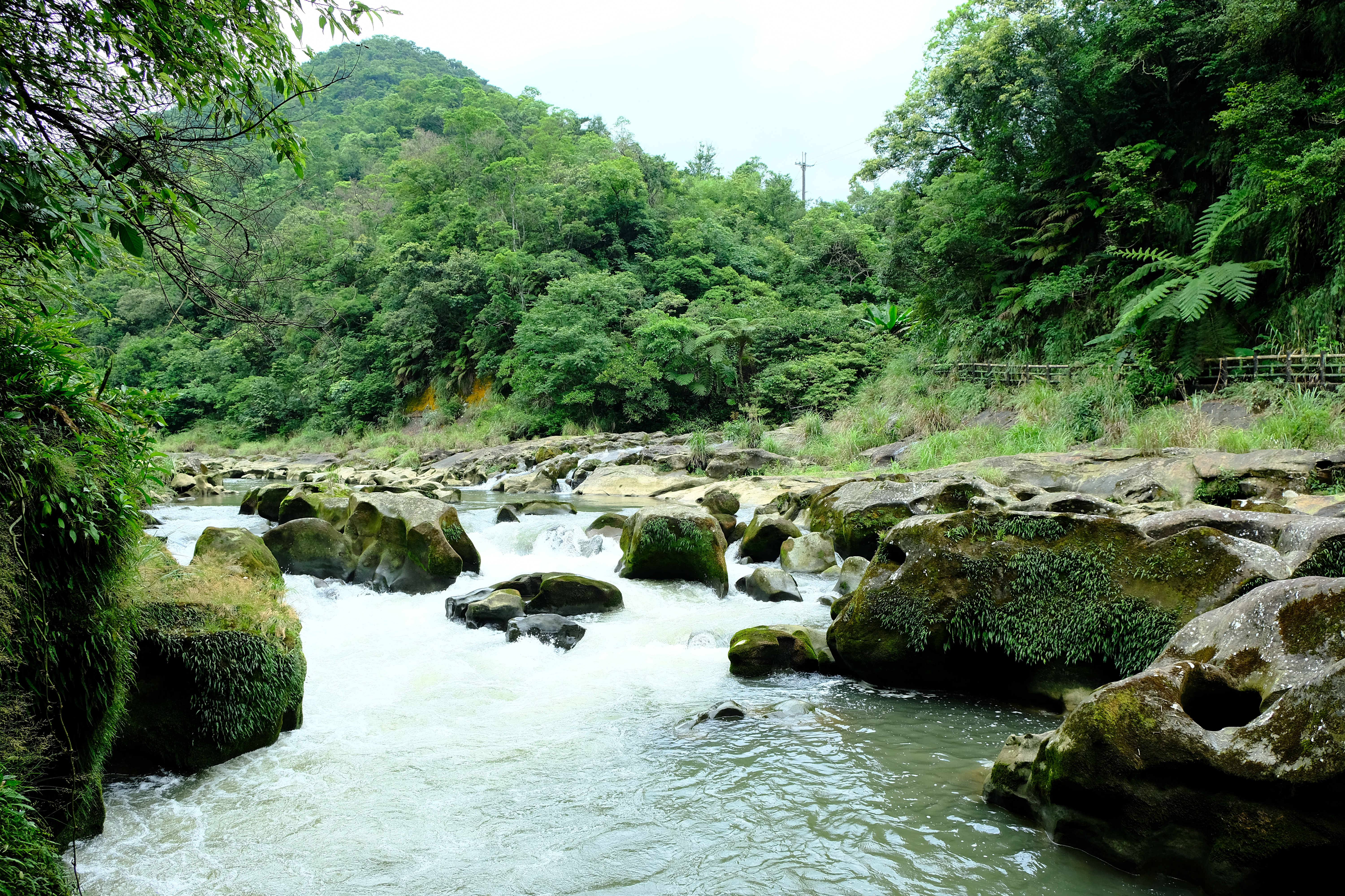 2019 DaHua pothole 平溪區大華壺穴